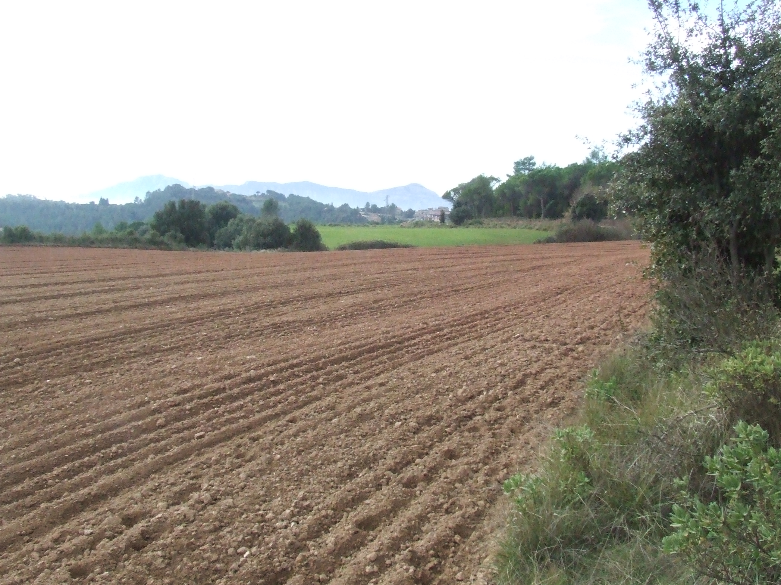 Granera. Pla del Milhomes 2